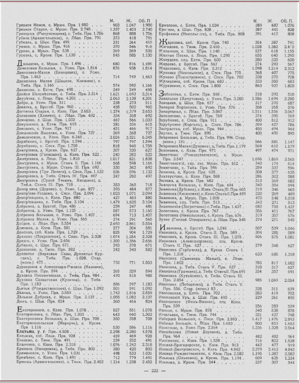 Перепись 1897